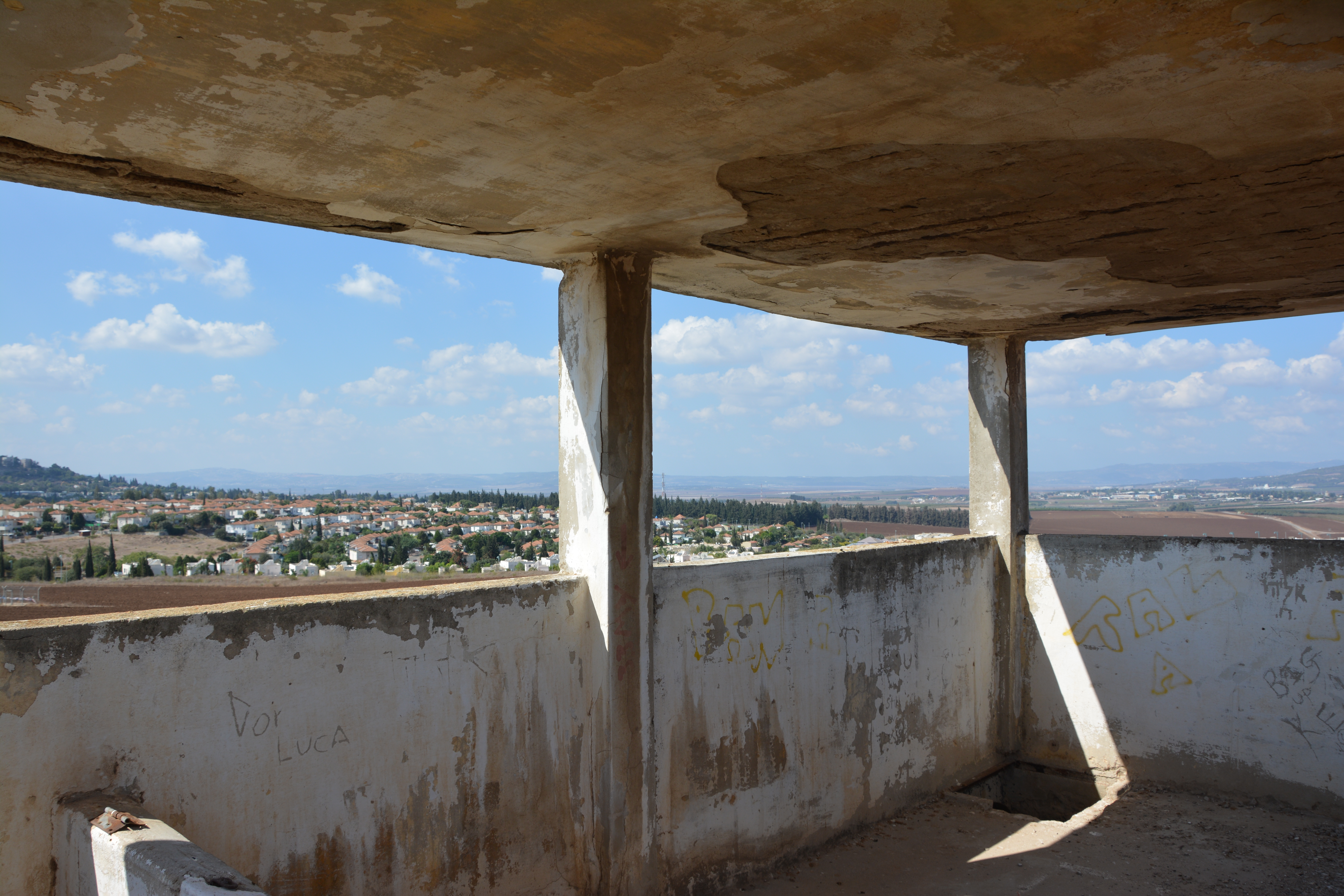 מחנה ישראל (דברת) היה קומונה של פועלי אגודת ישראל שהתארגנה לקראת חיי קיבוץ. אנשי הקבוצה התיישבו על אדמה שנרכשה בשנת 1925 בעמק יזרעאל, ליד קיבוץ דברת של היום.